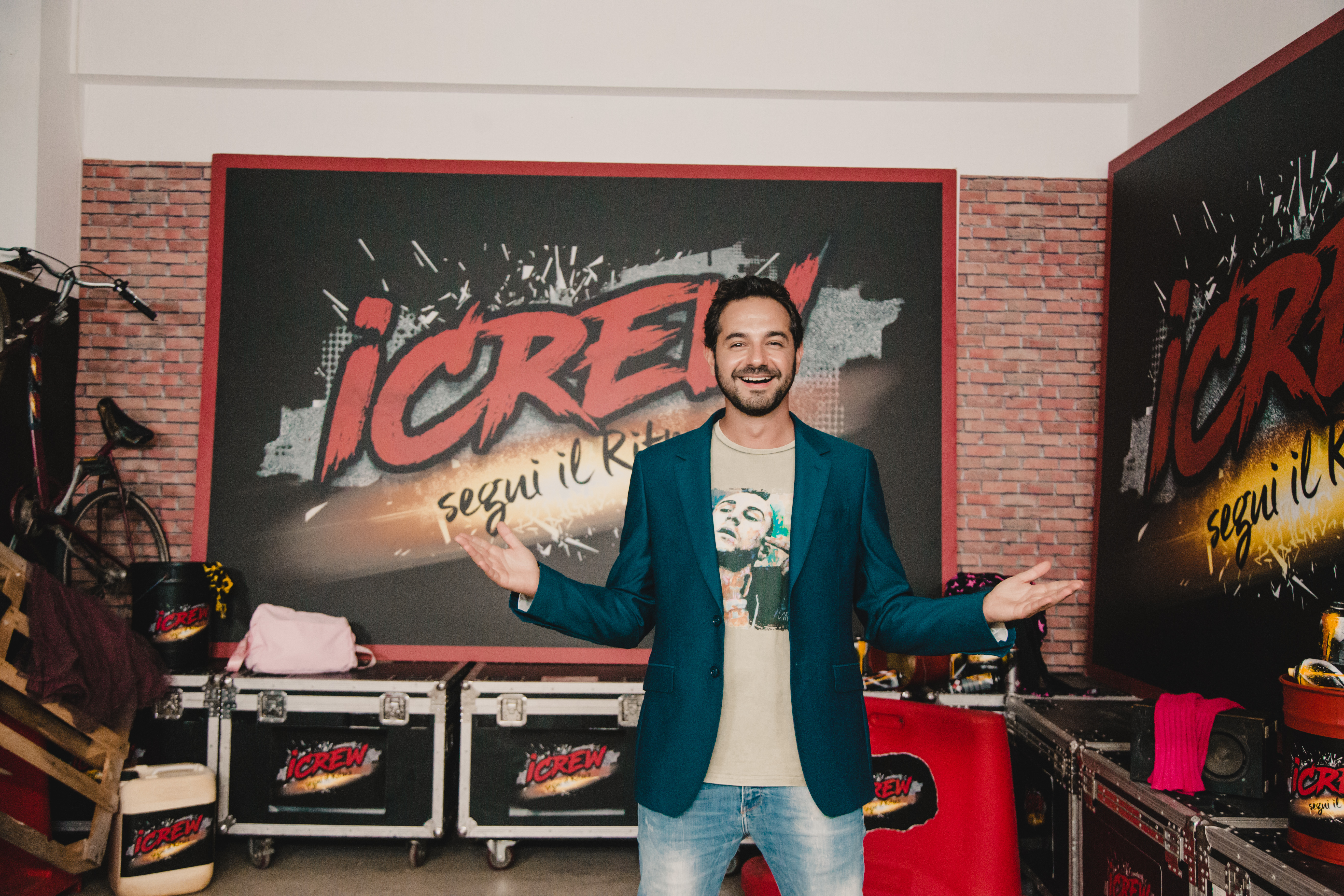 Durante le registrazioni del Talent Show "ICrew2"